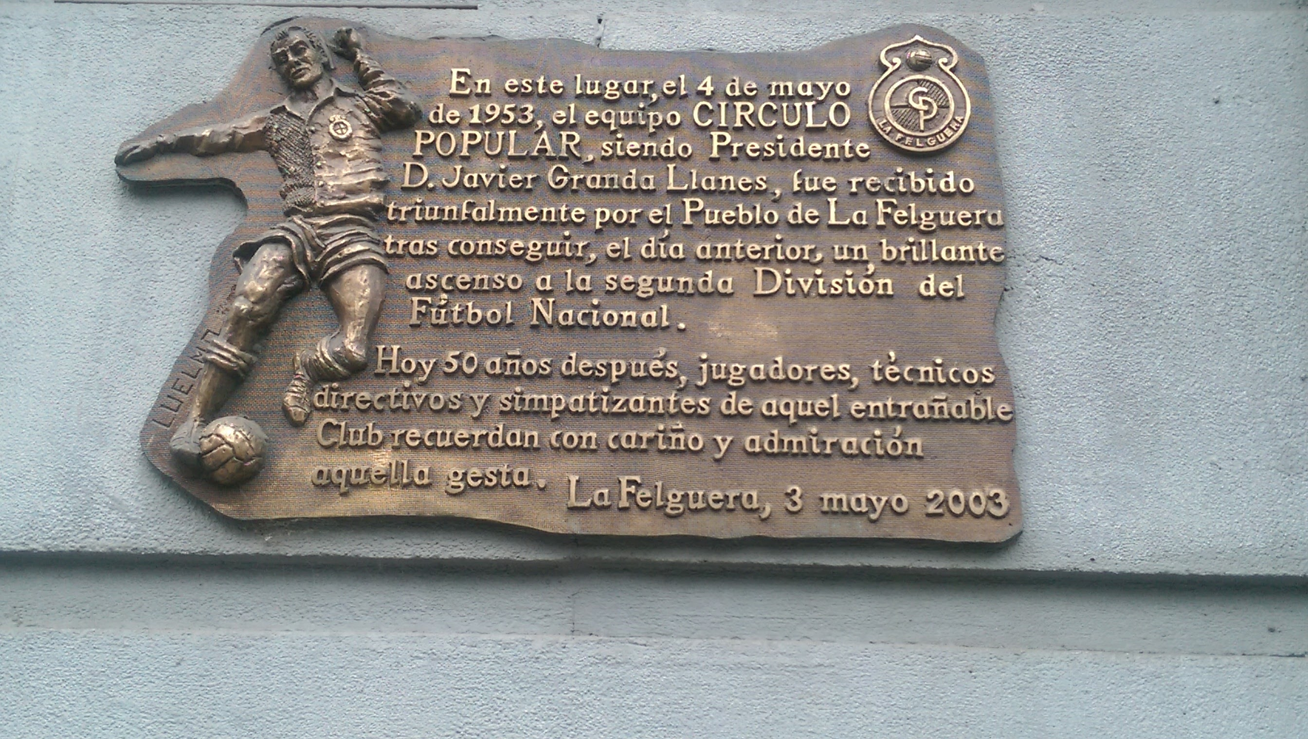 Cuencas Mineras This is a photography of a Special Area of Conservation in Spain with the ID: ES1200039. Natura2000 entry, EEA entry